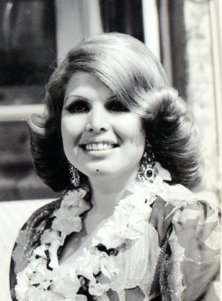 Portrait de la chanteuse tunisienne Naâma